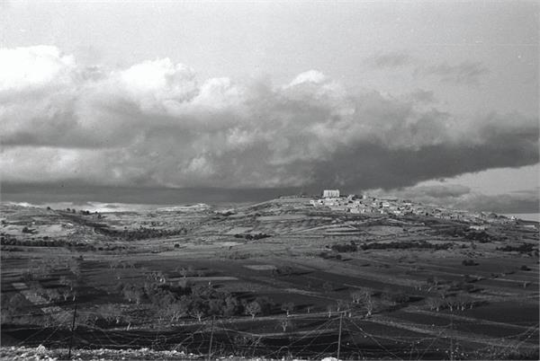 גוש חלב.